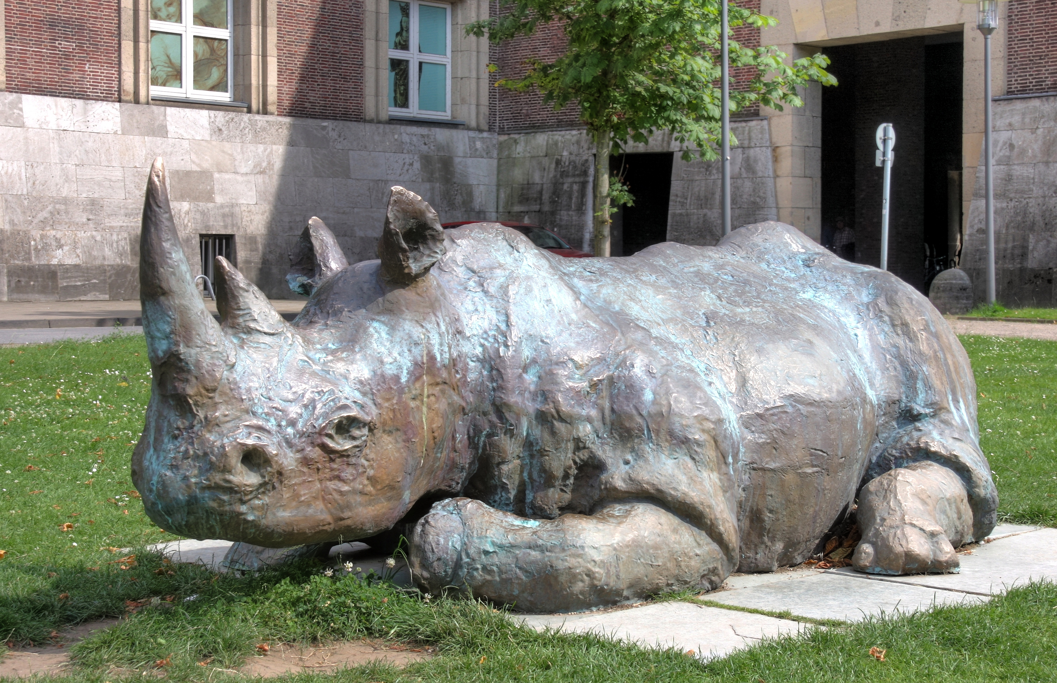 Nashorn